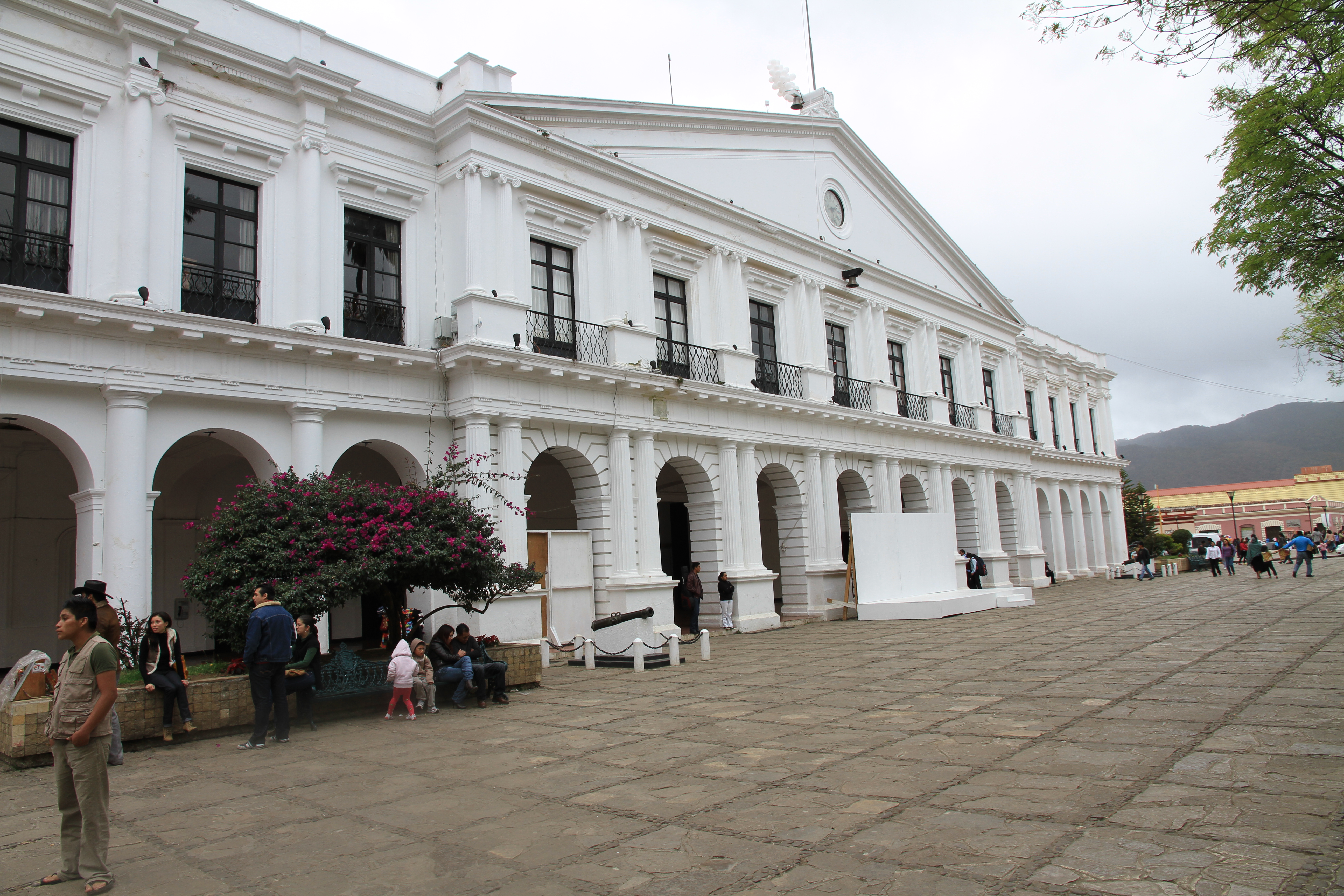 Palacio Municipal San Cristobal de las Casas